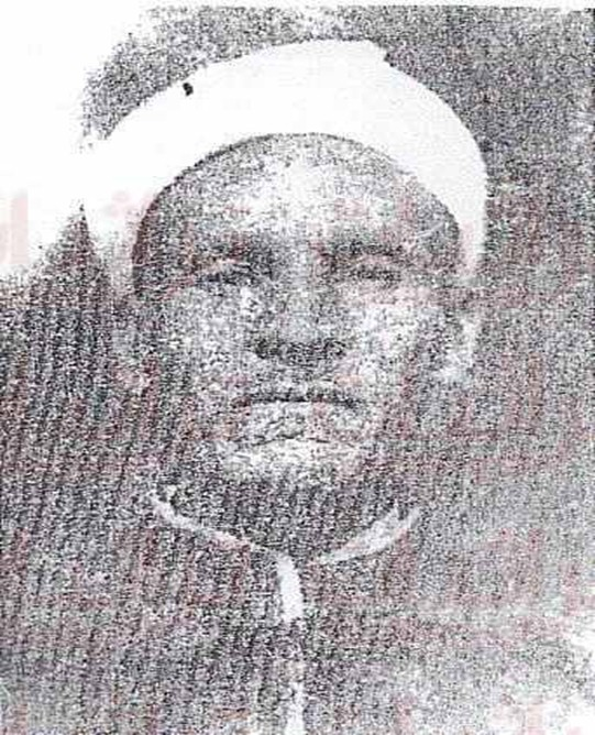 الشيخ علي بن أحمد بن علي الجرجاوي.